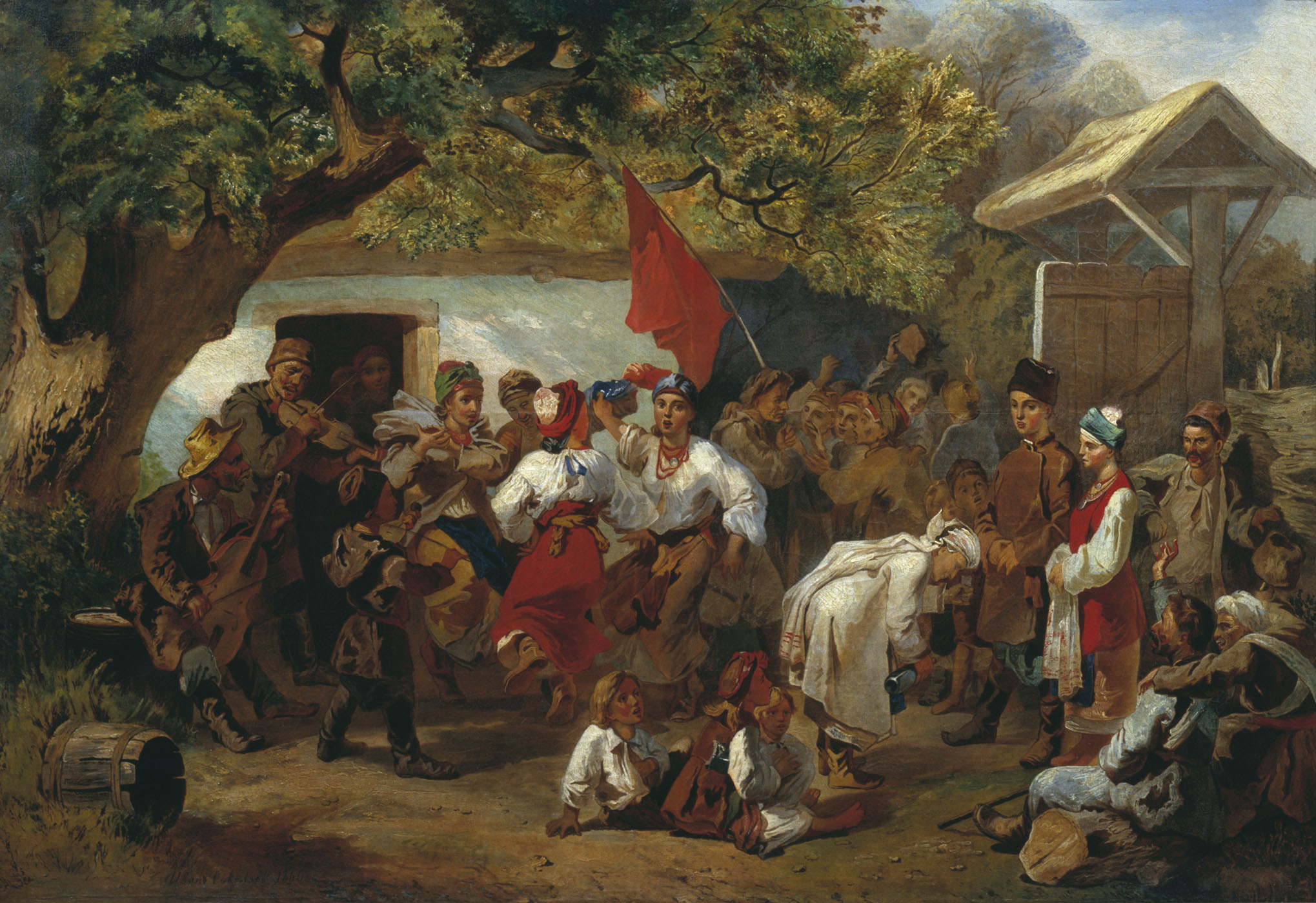 Соколов И.И. Свадьба. 1860 г. Холст, масло. 80,2х134 см. Сумской художественный музей.